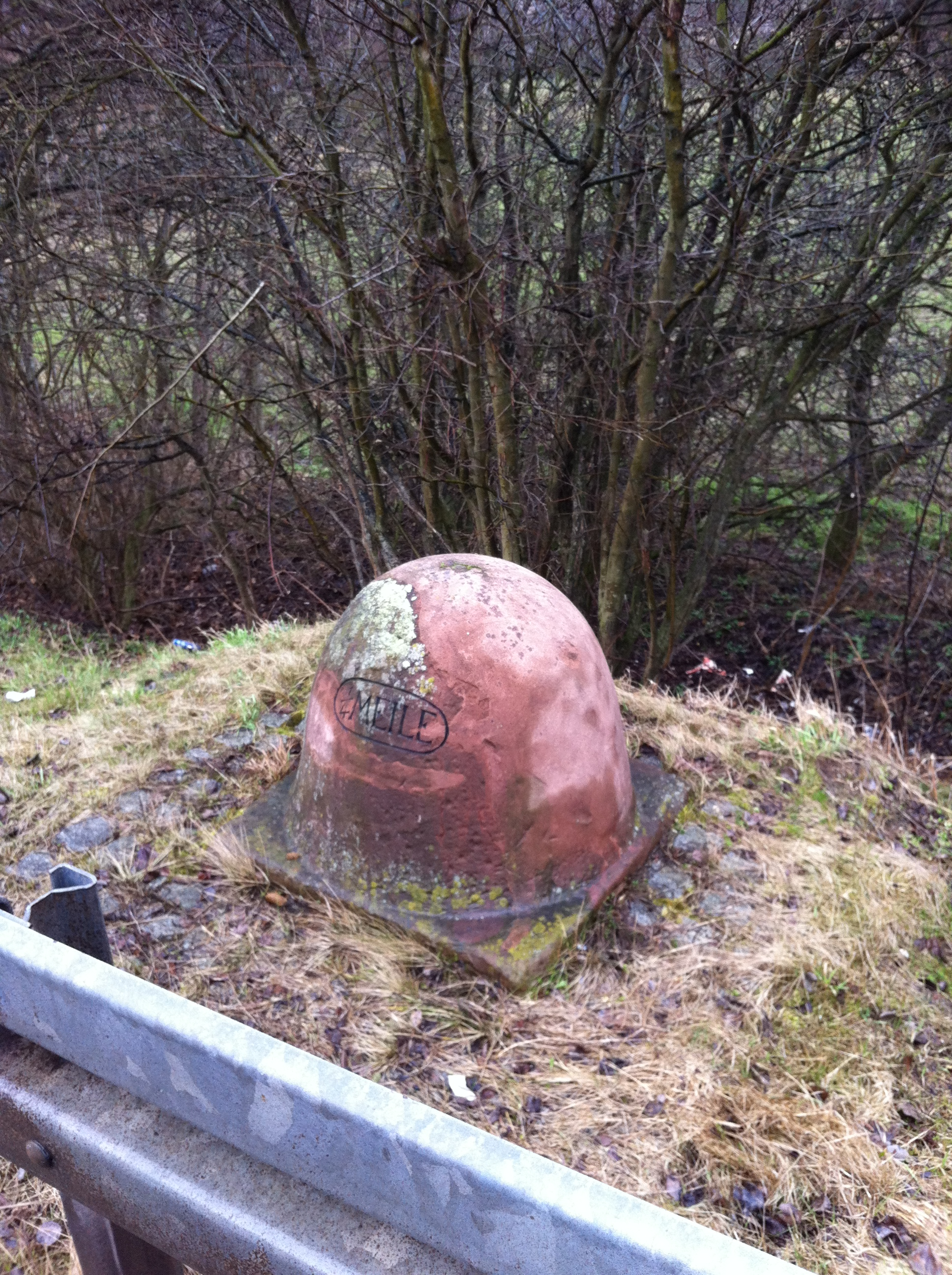 Preußischer Viertelmeilenstein nahe Wimmelburg an der ehemaligen Kunststraße Langenbogen - Eisleben -Sangerhausen - Nordhausen, der 1826 gesetzt wurde